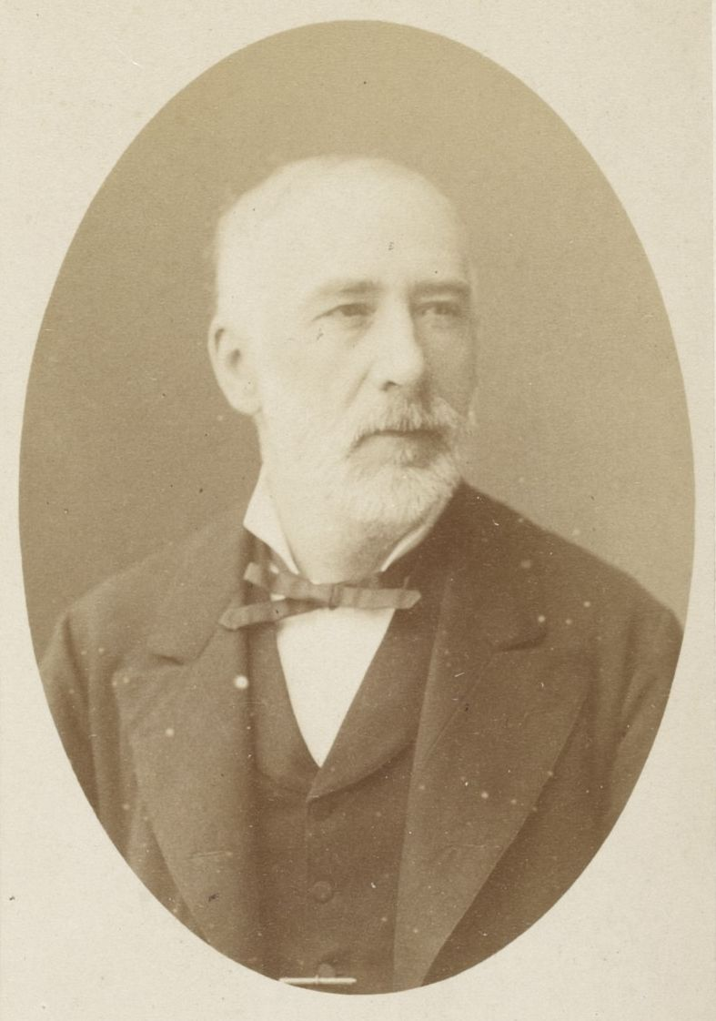 Philippe de Clermont par Eugène Pirou